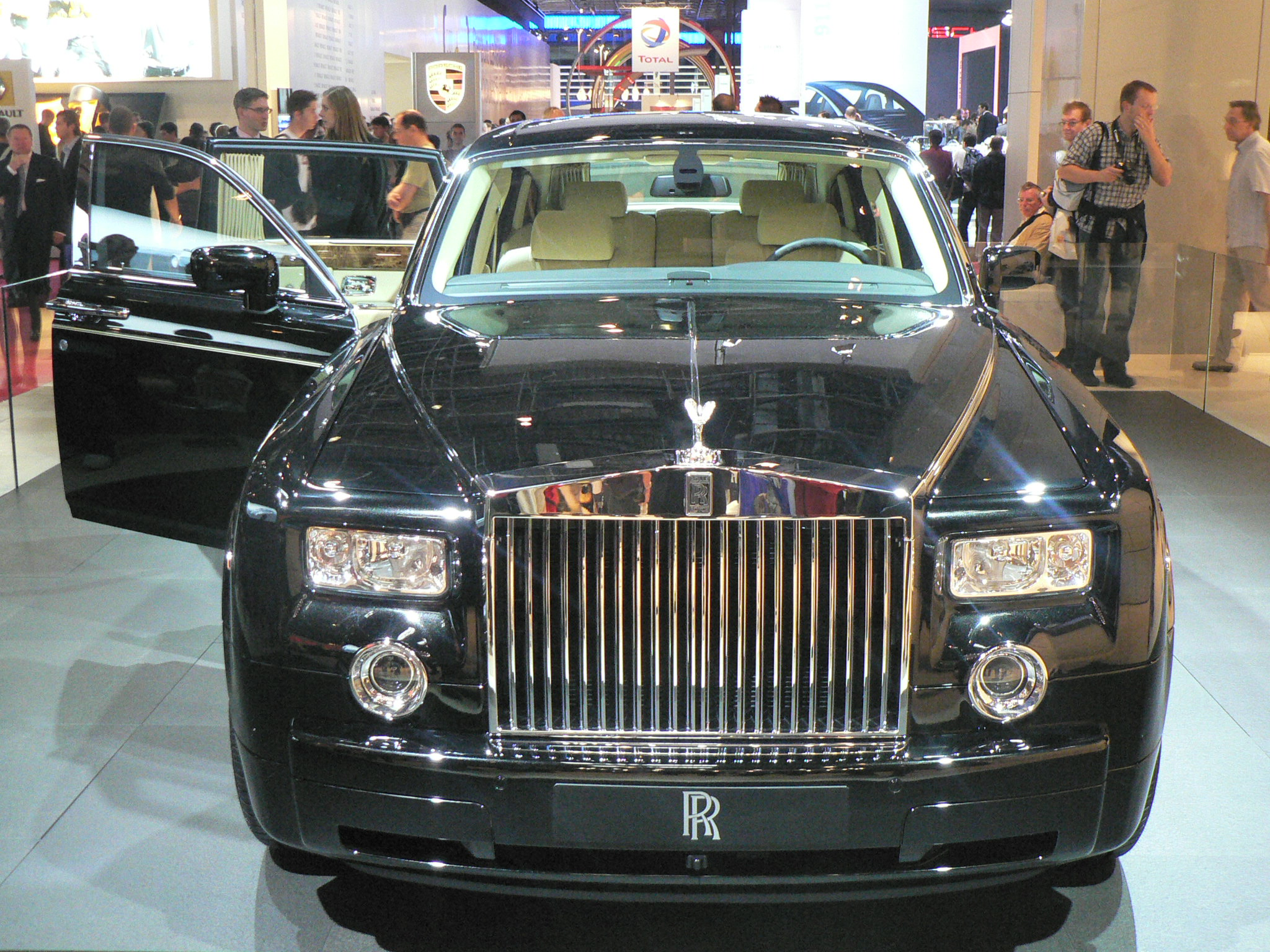 Mondial de l'automobile, Paris 2006